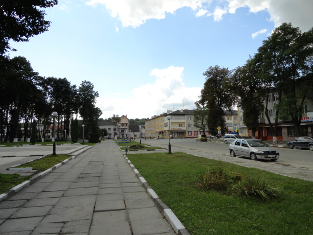 Центральная площадь г. Николаев Львовской области Украины.